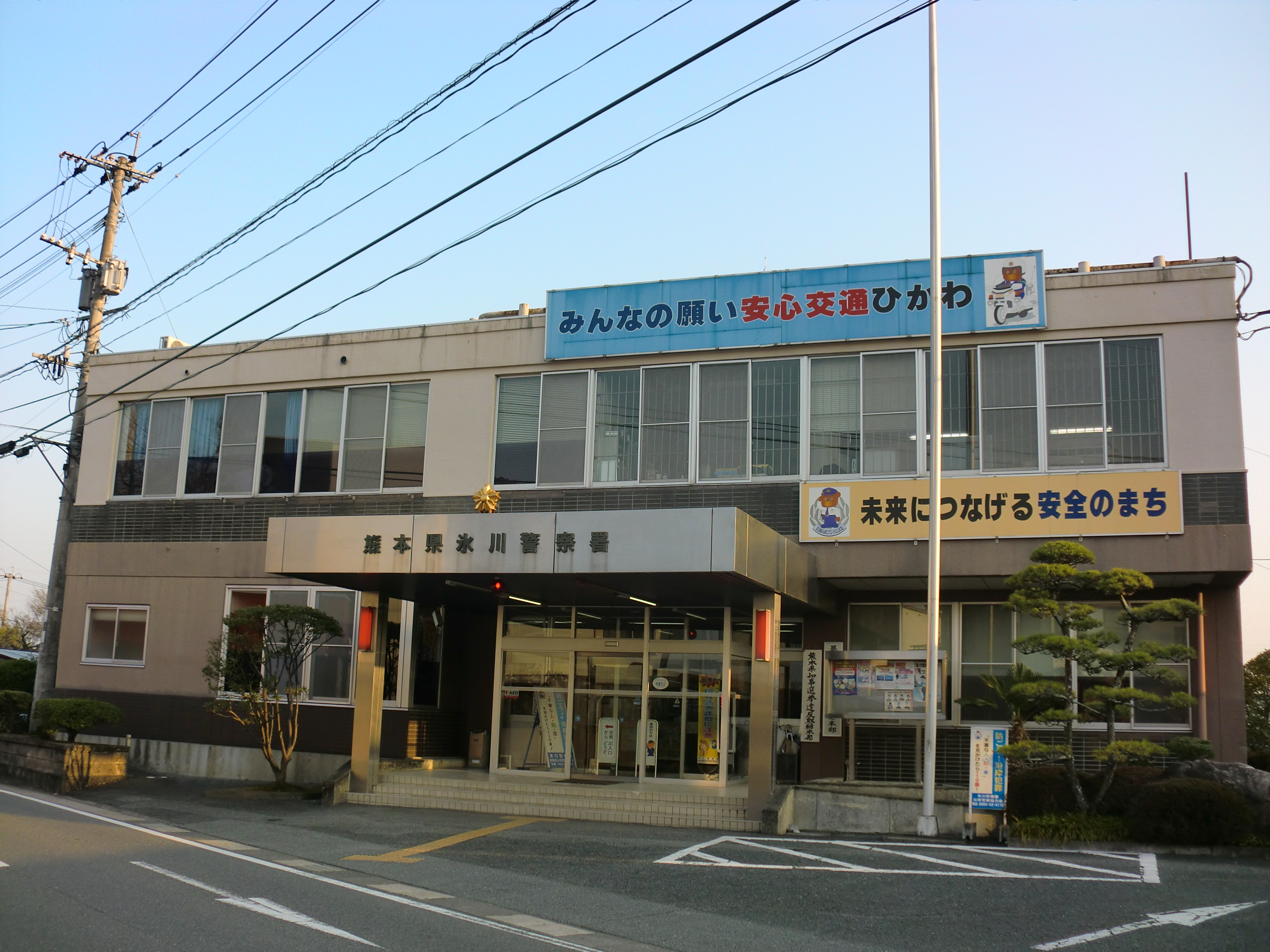 熊本県八代郡氷川町にある氷川（ひかわ）警察署